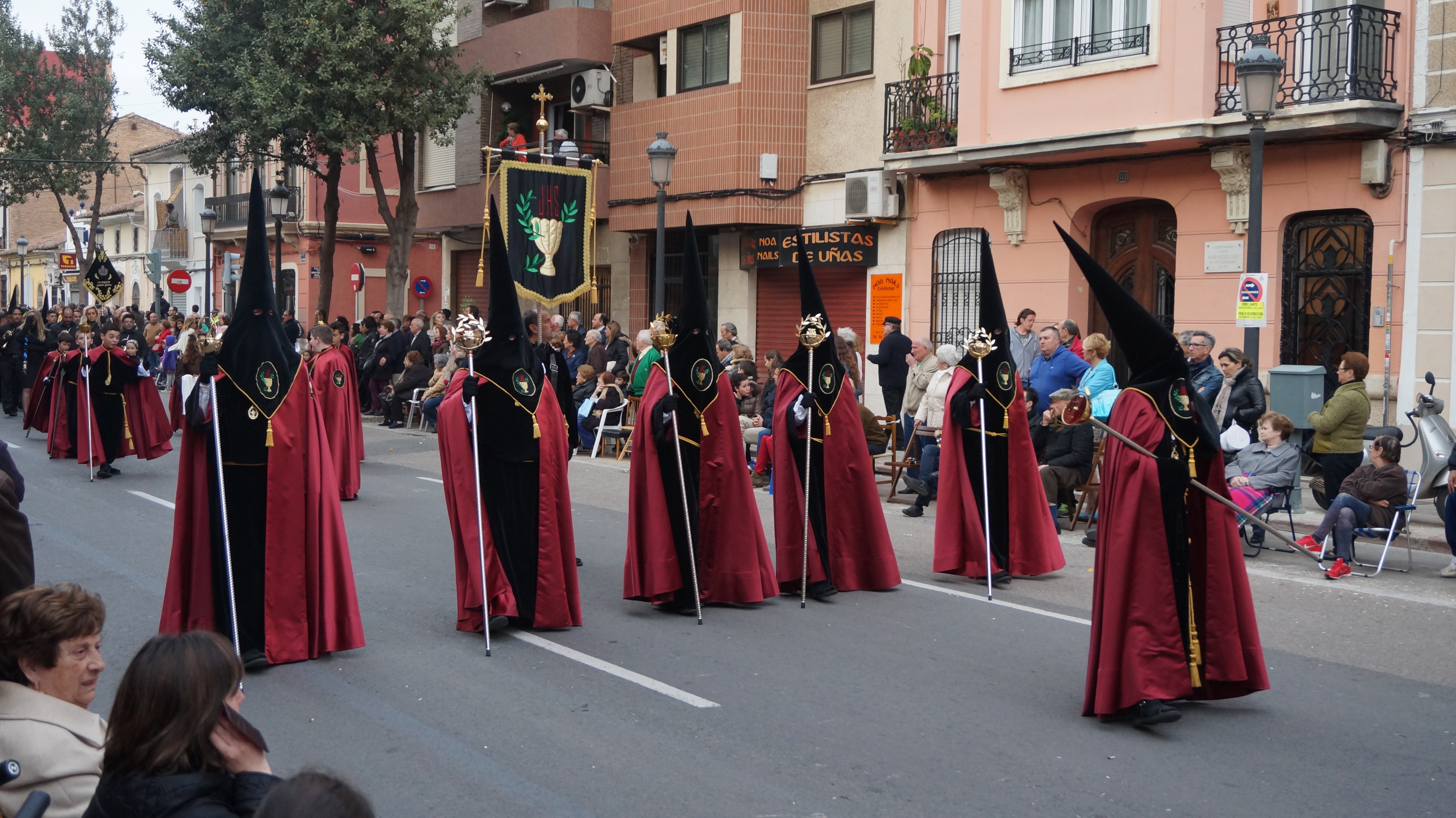 Semana Santa Marinera